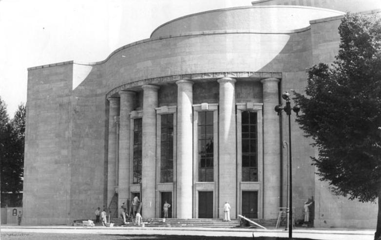 Illus Kreter 1.8.51 Vom Aufbau der Volksbühne. Der Stellvertreter des Ministerpräsidenten und Minister für Aufbau, D. Lothar Volz, besichtigte am 31.7.51 mit dem Leiter der Staatlichen Kommission für Kunstangelegenheiten, Staatssekretär Helmut Holtzhauer, und Mitarbeitern des Ministerims für Aufbau, der Deutsch Auakedemie und des volkseigenen Projektierungsbüros Berlin die im Wiederaufbau befindliche Volksbühne. UBz: Die neue Aussenfront der Volksbühne.